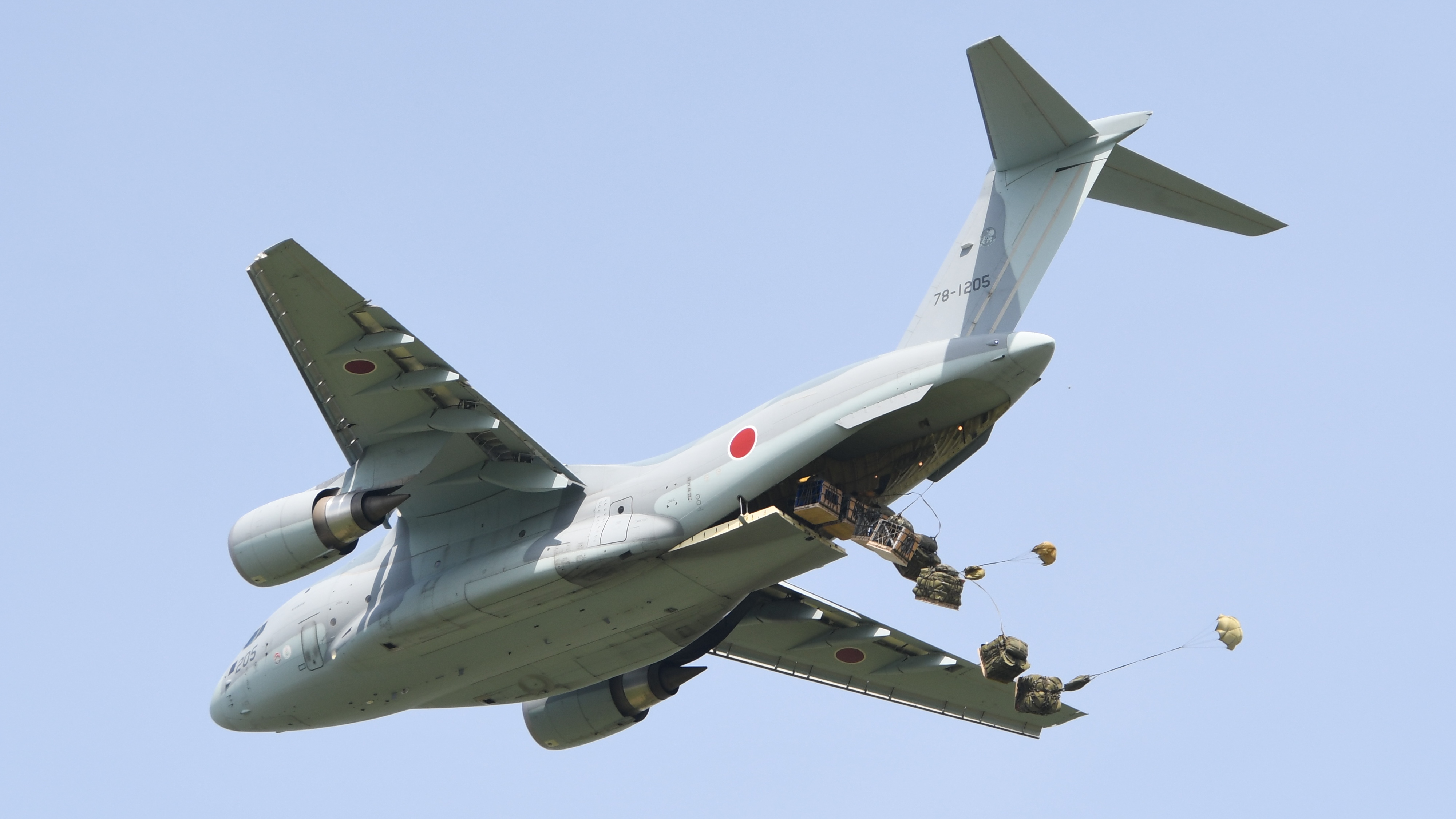 航空自衛隊 C-2輸送機（78-1205号機） PDS（プラットフォーム・デリバリー・システム）空中投下デモンストレーション。2018年5月27日 美保基地にて。